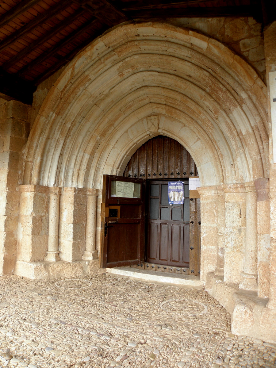 Portada de la iglesia de Sandoval de la Reina